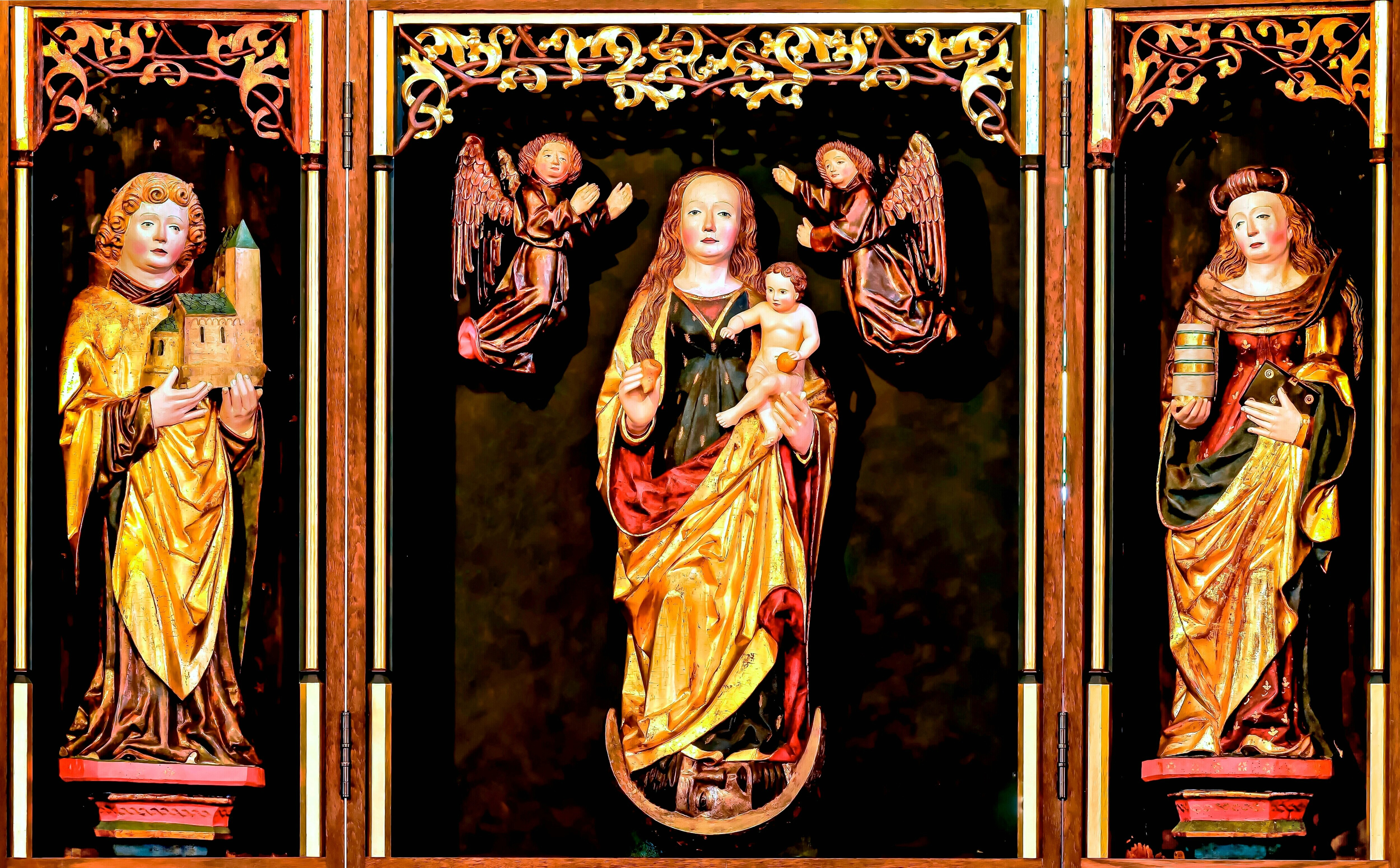 Spätgotischer Flügelaltar in der Pfarrkirche Sankt Kastor in Dausenau an der Lahn (um 1470): links der Kirchenpatron Sankt Castor von Karden, in der Mitte die Mondsichelmadonna, rechts Maria Magdalena.